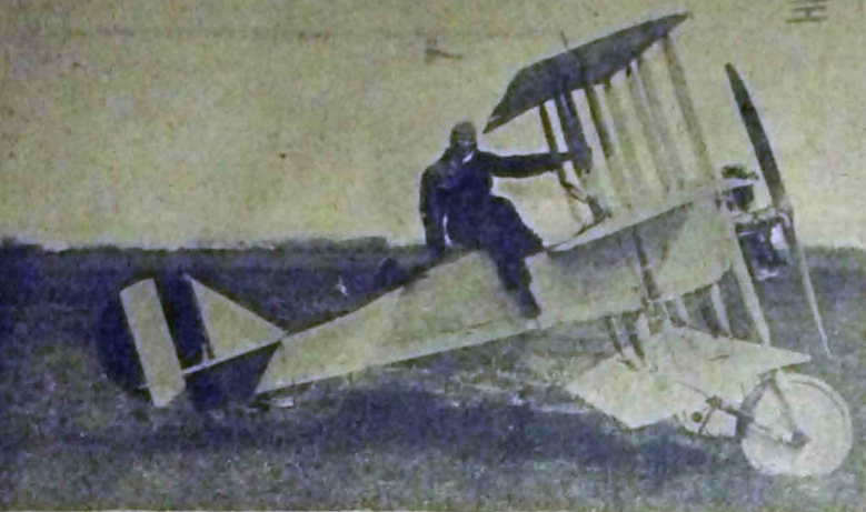 Lodovico Montegani su triplano Pensuti